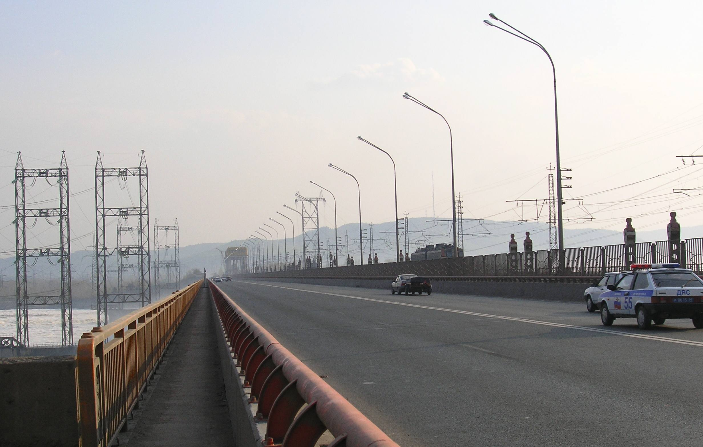 Дорога по плотине Жигулёвской ГЭС, Федеральная трасса М5 - Урал, Тольятти, Россия